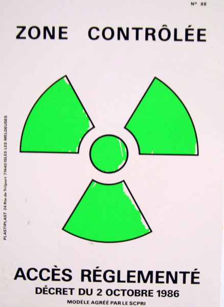 Zone contrôlée - Accès réglementé - Décret du 2 octobre 1986. Une zone d'accès réglementé est un espace entourant une source de rayonnements ionisants situé dans un établissement ou un chantier qui se trouve assujetti à des règles particulières aux fins de radioprotection et dont l'accès est réglementé et réservé aux seules personnes autorisées. ((France))